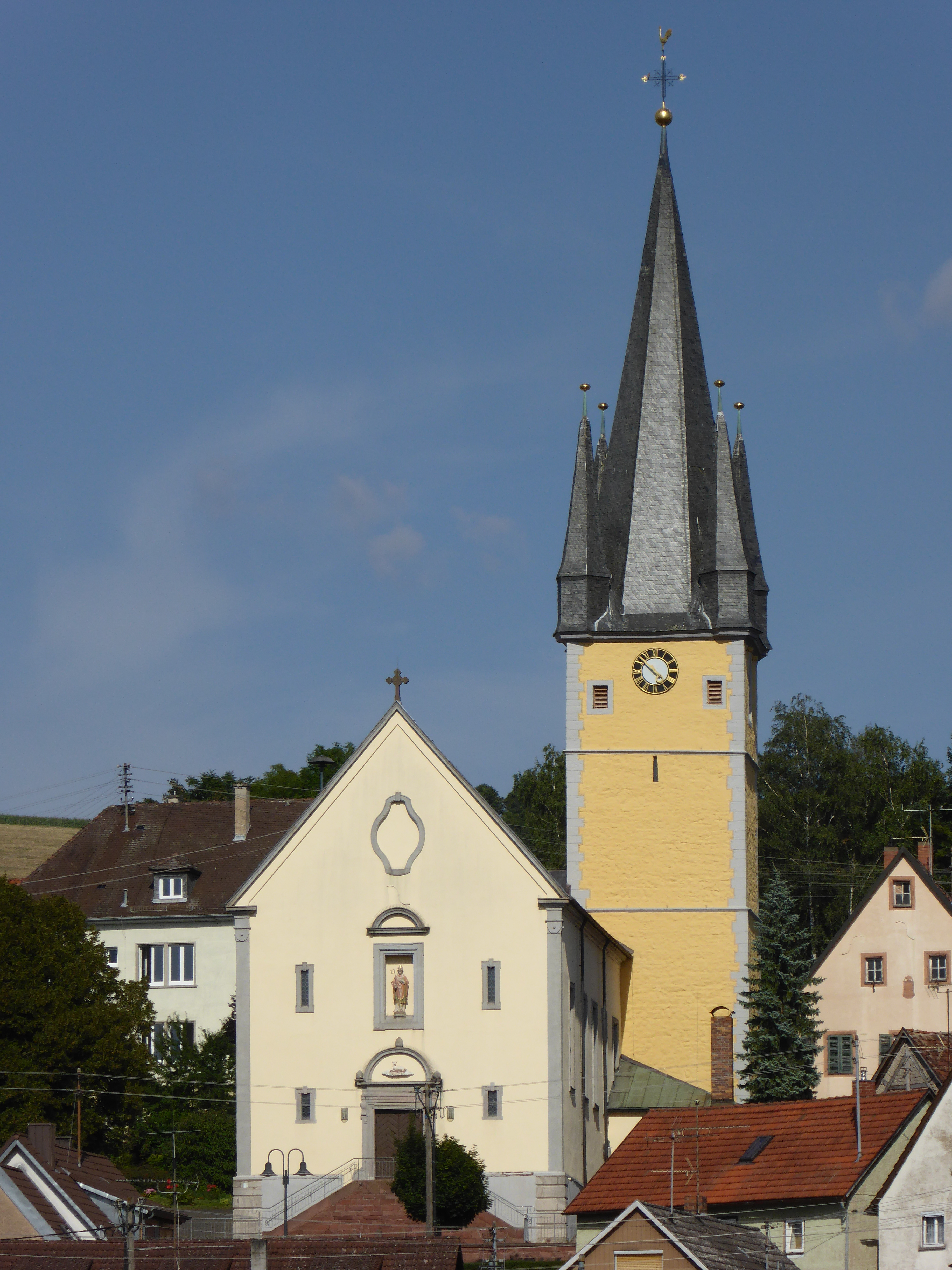 Katholische Pfarrkirche St. Nikolaus in Tauberbischofsheim, Ortsteil Impfingen. Gotischer Turm mit Erweiterung von 1700–1704.